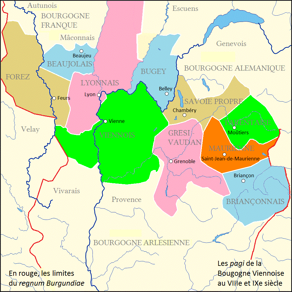 A partir de l'avènement de Charles Martel, le regnum Burgundiae fut divisé en quatre commandements, ayant chacun son propre gouverneur : la Bourgogne d'Arles, la Bourgogne de Vienne, la Bourgogne alémanique et la Bourgogne franque. Cette carte montre les différents pagi de la Bourgogne Viennoise au VIIIe et IXe siècle.